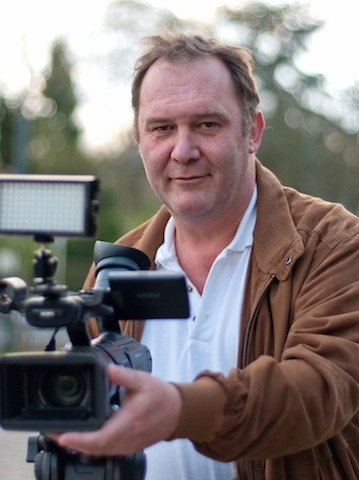 Erik Silance